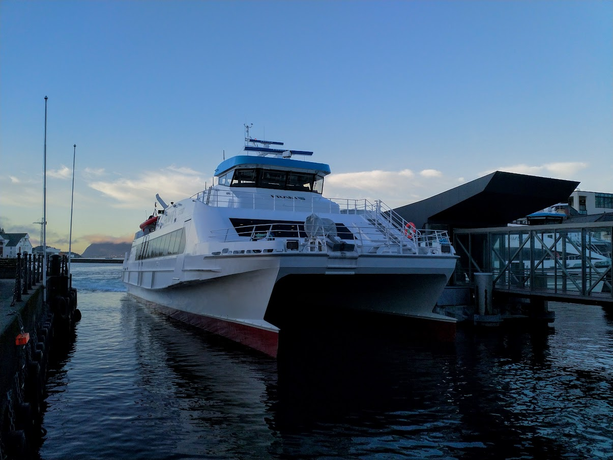 MS «Godøy» ved kai i Ålesund indre havn nord den 11. desember 2018